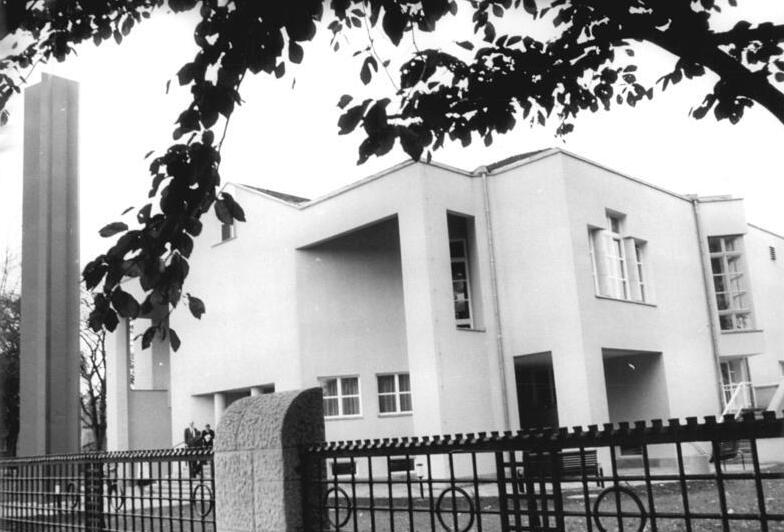 Dresden, Mormonisches Gemeindezentrum ADN-ZB Häßler 25.10.1988 Dresden: Gemeindezentrum eröffnet-Ein neues Gemeindezentrum der Kirche Jesu Christi der Heiligen der Letzten Tage (Mormonen) wurde übergeben. In dem Haus befinden sich eine Kapelle, ein Taufraum und andere Einrichtungen für den Gottesdienst. Es ist zugleich Sitz der Regionspräsidentschaft dieser Kirche in der DDR. Blick auf das Zentrum von der Tiergartenstraße.